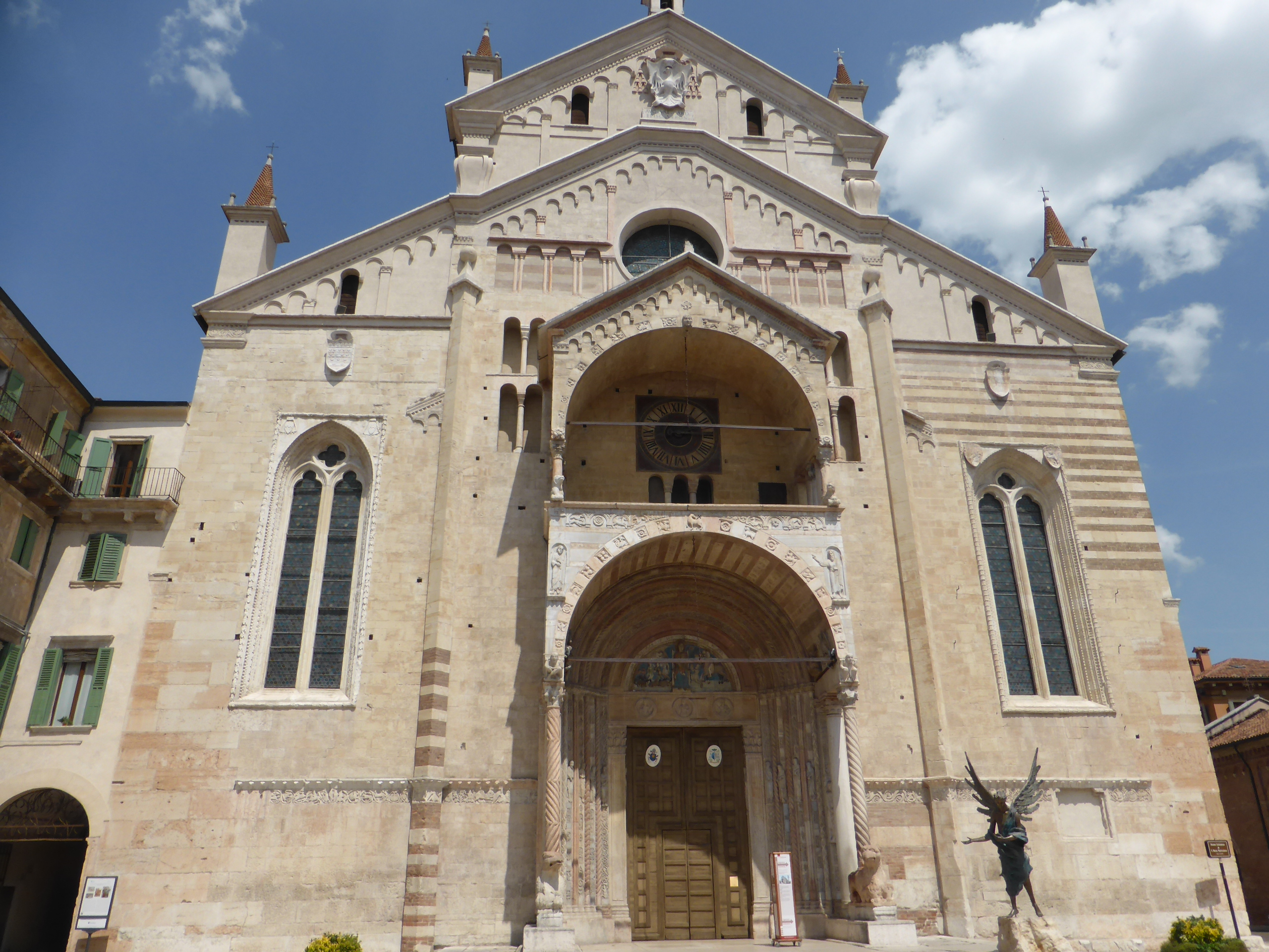 Dom von Verona